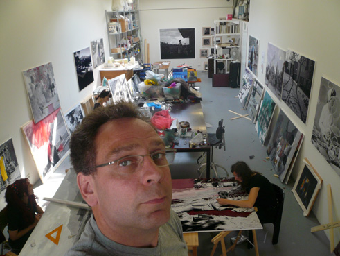 Berend Strik in zijn studio